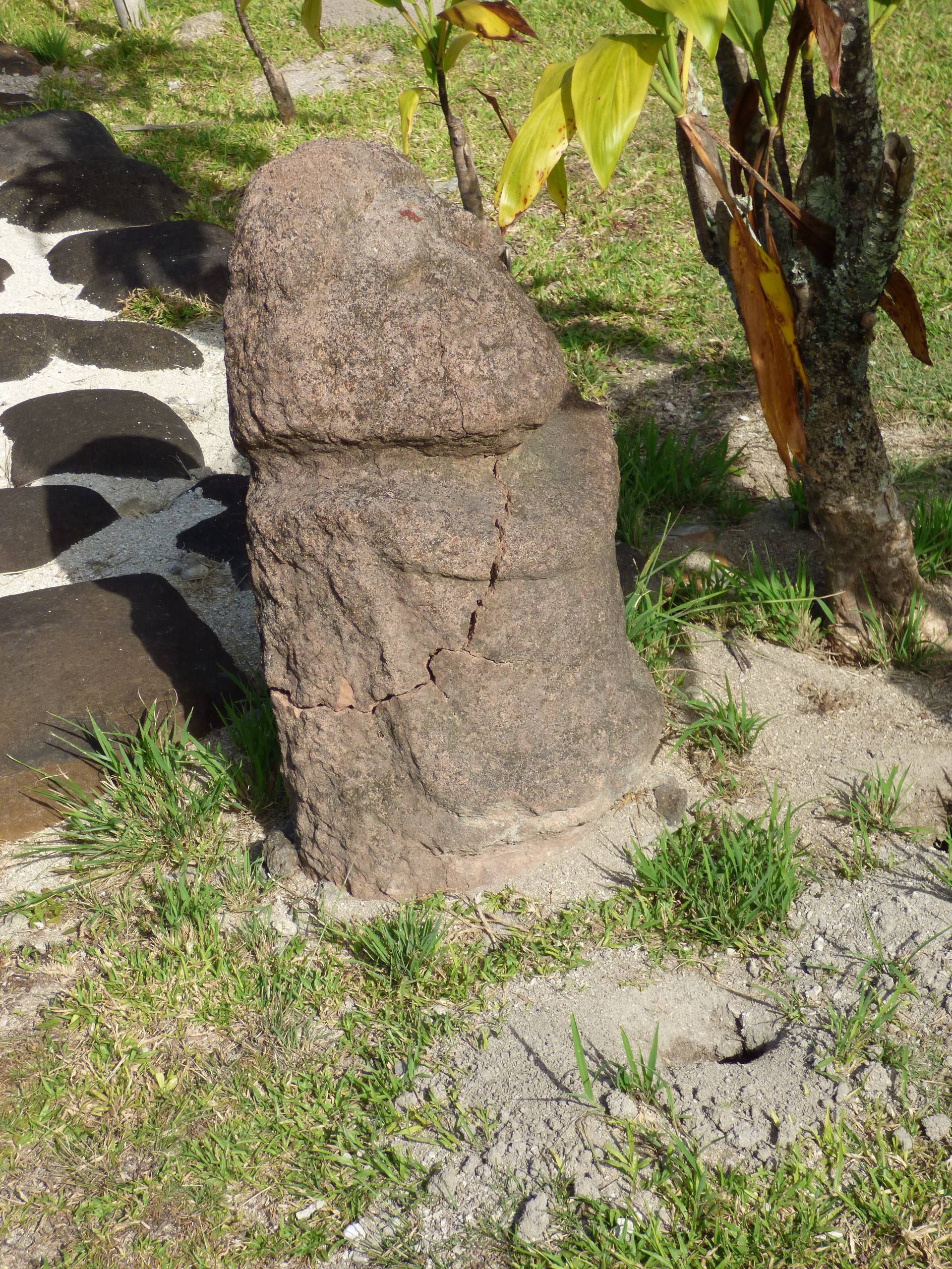 Le Marae est un lieu de culte des dieux et des ancêtres. Il est composé d'une cour pavée et d'une sorte de plateforme parfois complétée par des pierres dressées. Cette plateforme nommée ahu était réservée aux dieux et aux ancêtres.